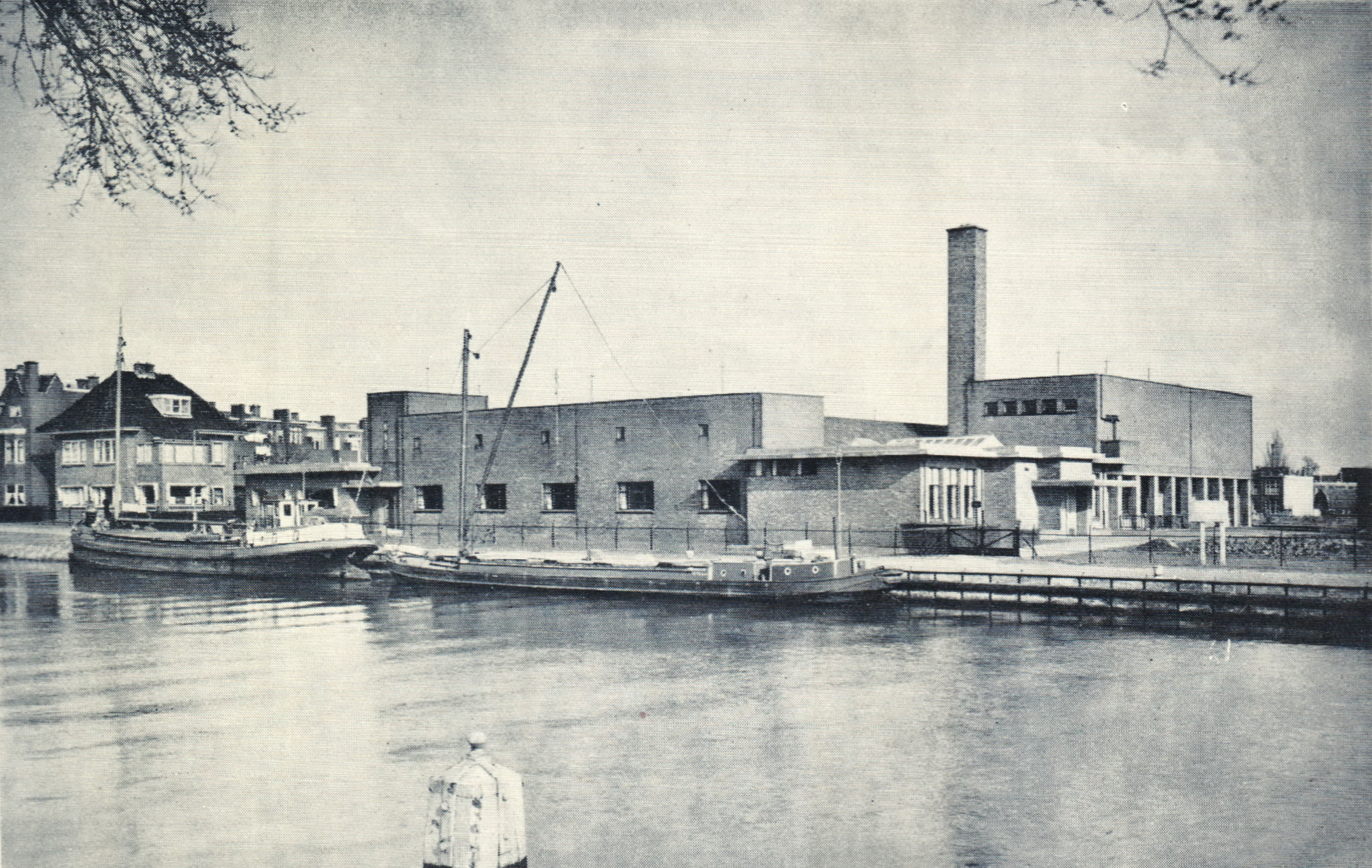 De fabriek van de Vereniging "Het Kaasmerk" te Leiden (ca 1927)